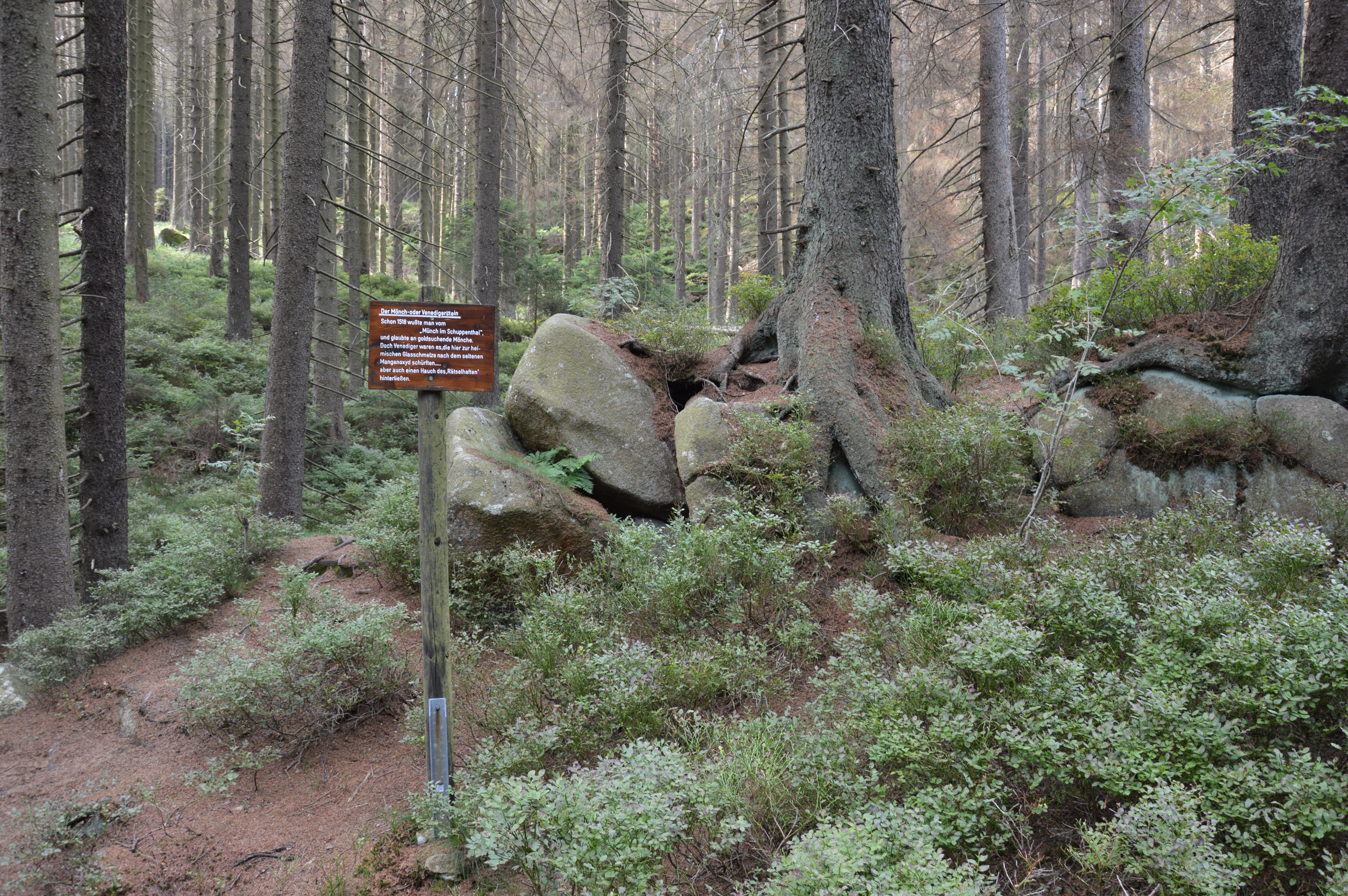 Mönchstein